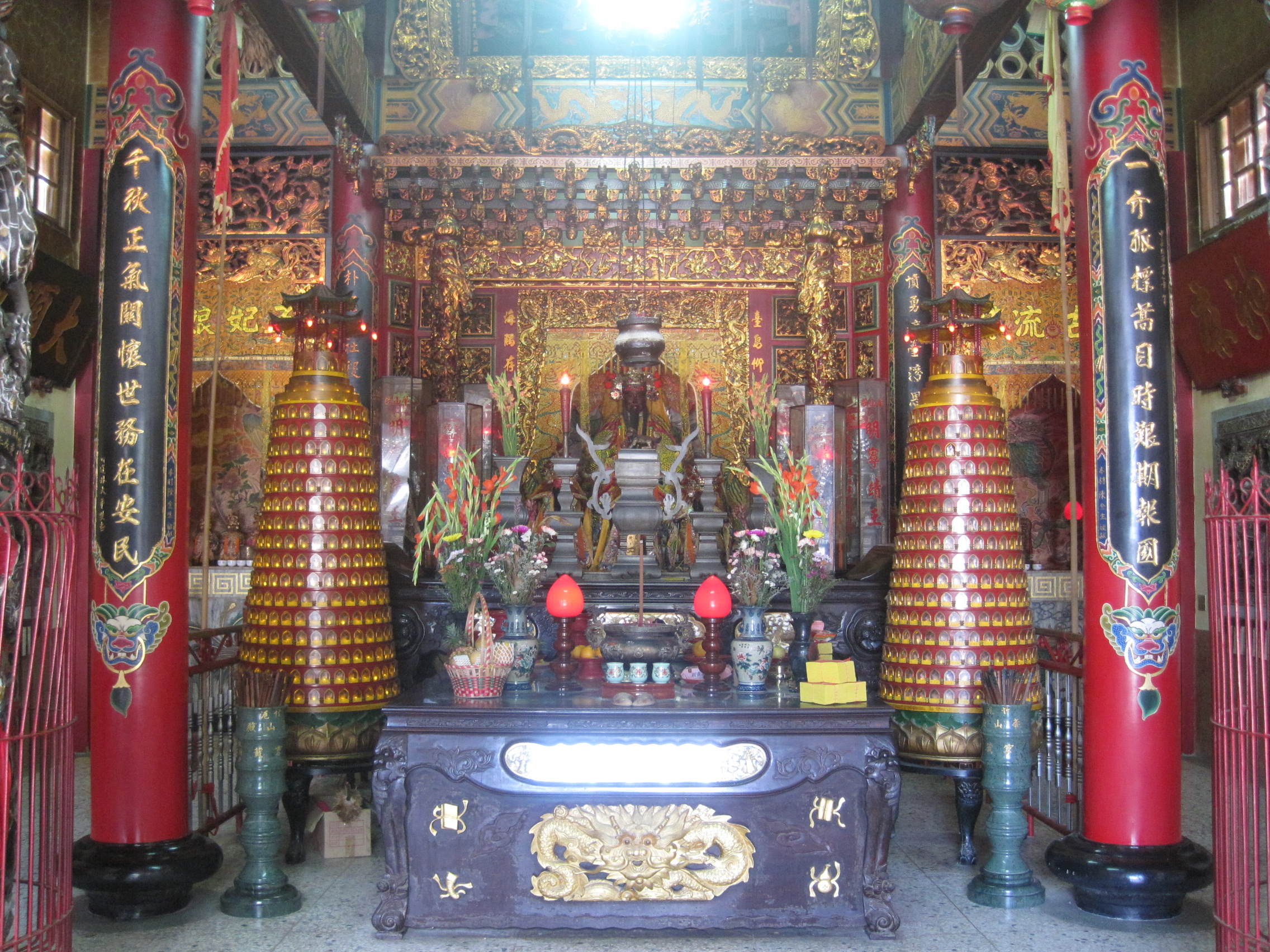 竹滬華山殿內景